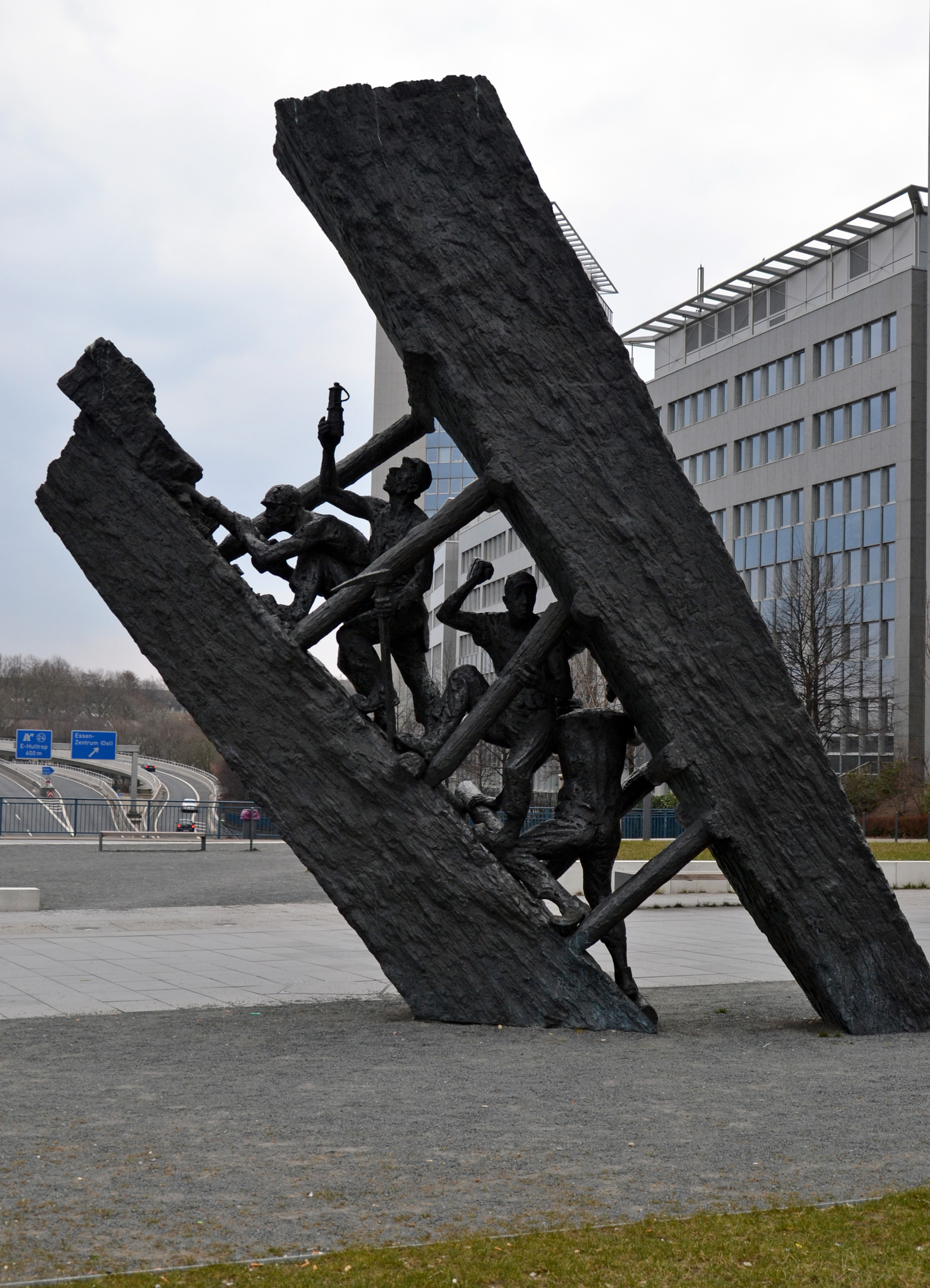 Essen-Südviertel: Bergarbeiterdenkmal "Steile Lagerung" vom Bildhauer Max Kratz, dahinter das Postbank-Hochhaus